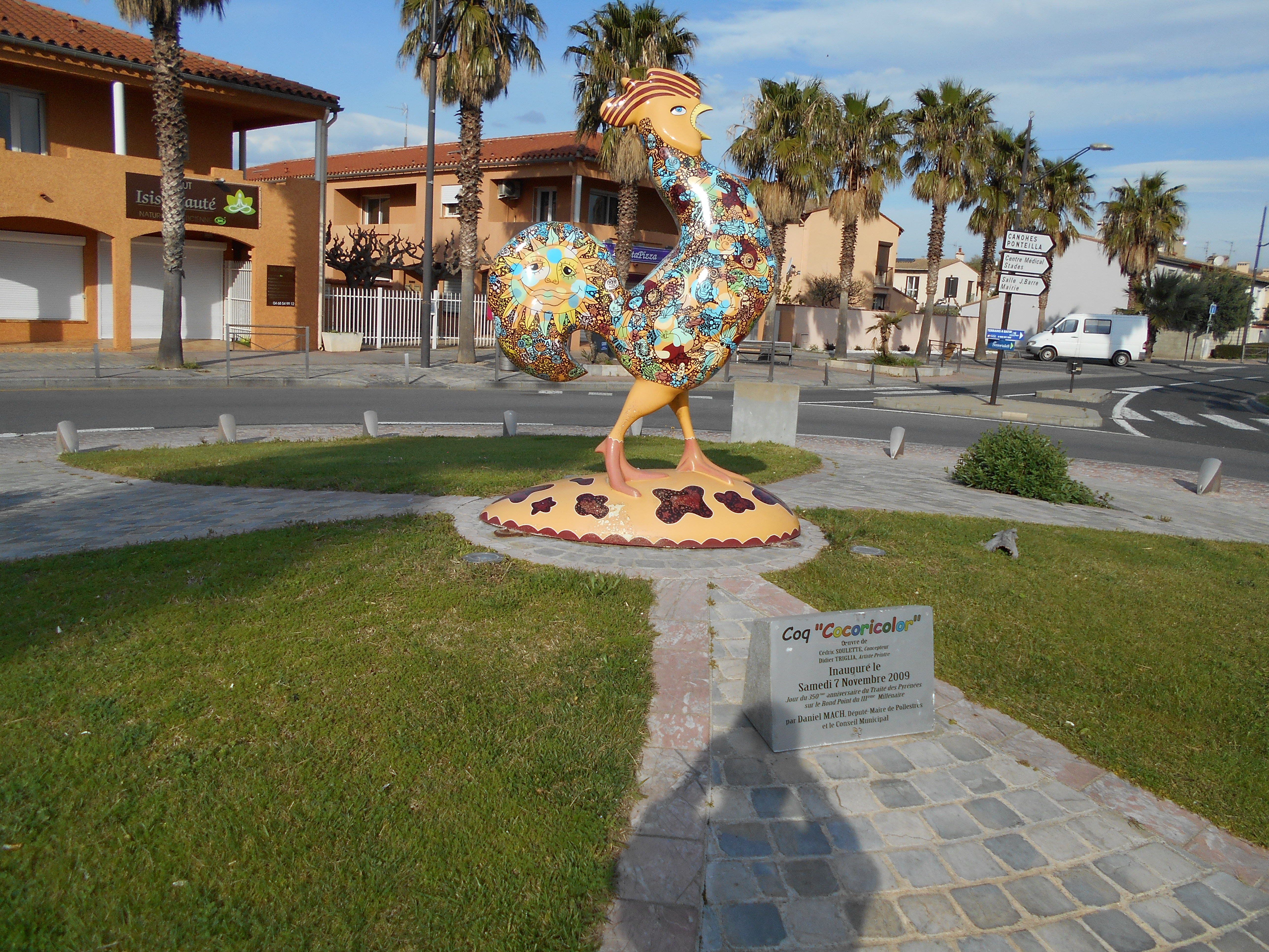 Escultura del pollastre multicolor de Pollestres